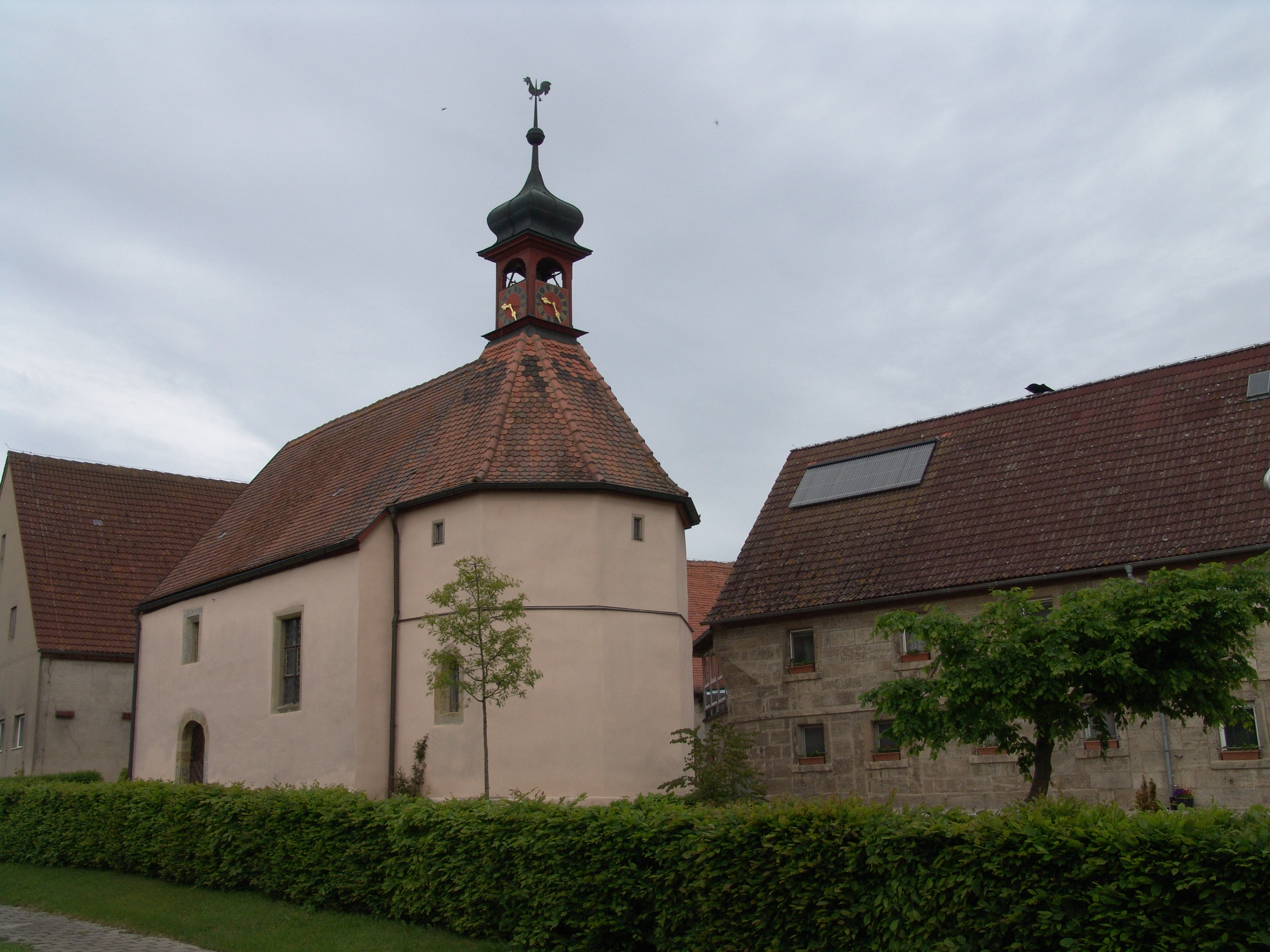 evang.-luth. Kirche St. Konrad in Reichelshofen